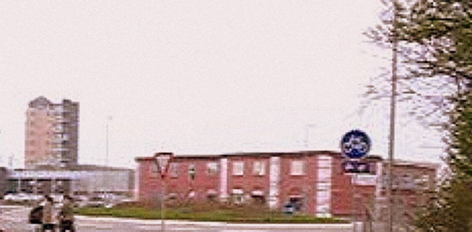 Hjørring Vestbanegård (efter brand og uden tagetagen)